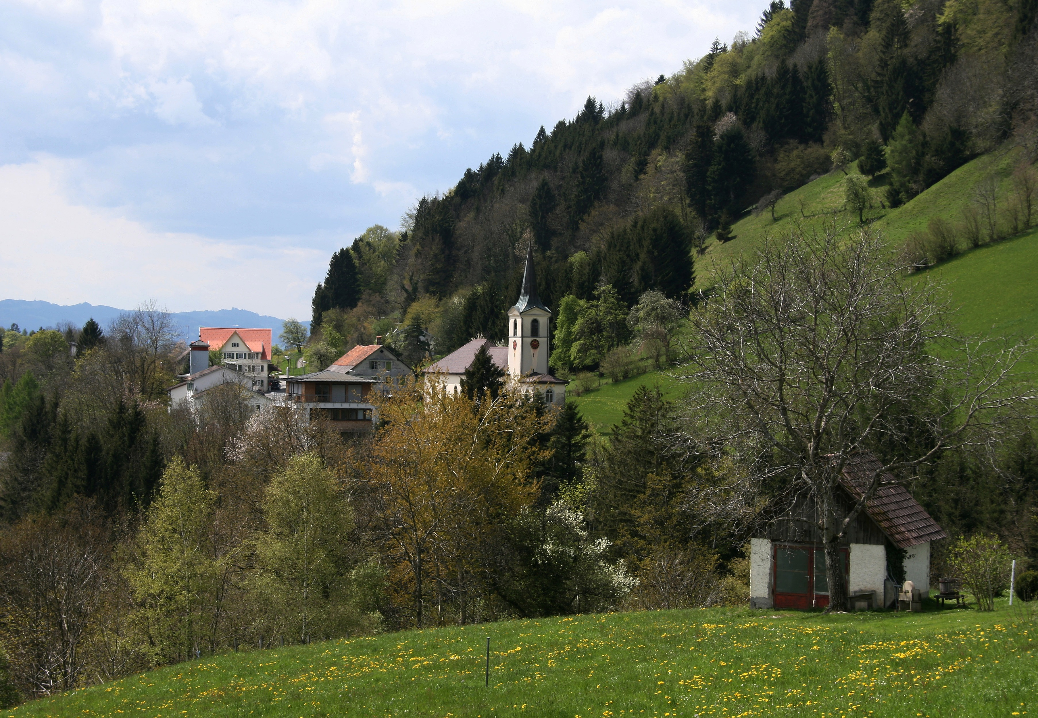 Pfarrkirche hl. Wendelin (Wallfahrtskirche),erbaut 1846 nach Plänen von Gabriel Mallaun, in der Fluh von Bregenz, Vorarlberg.